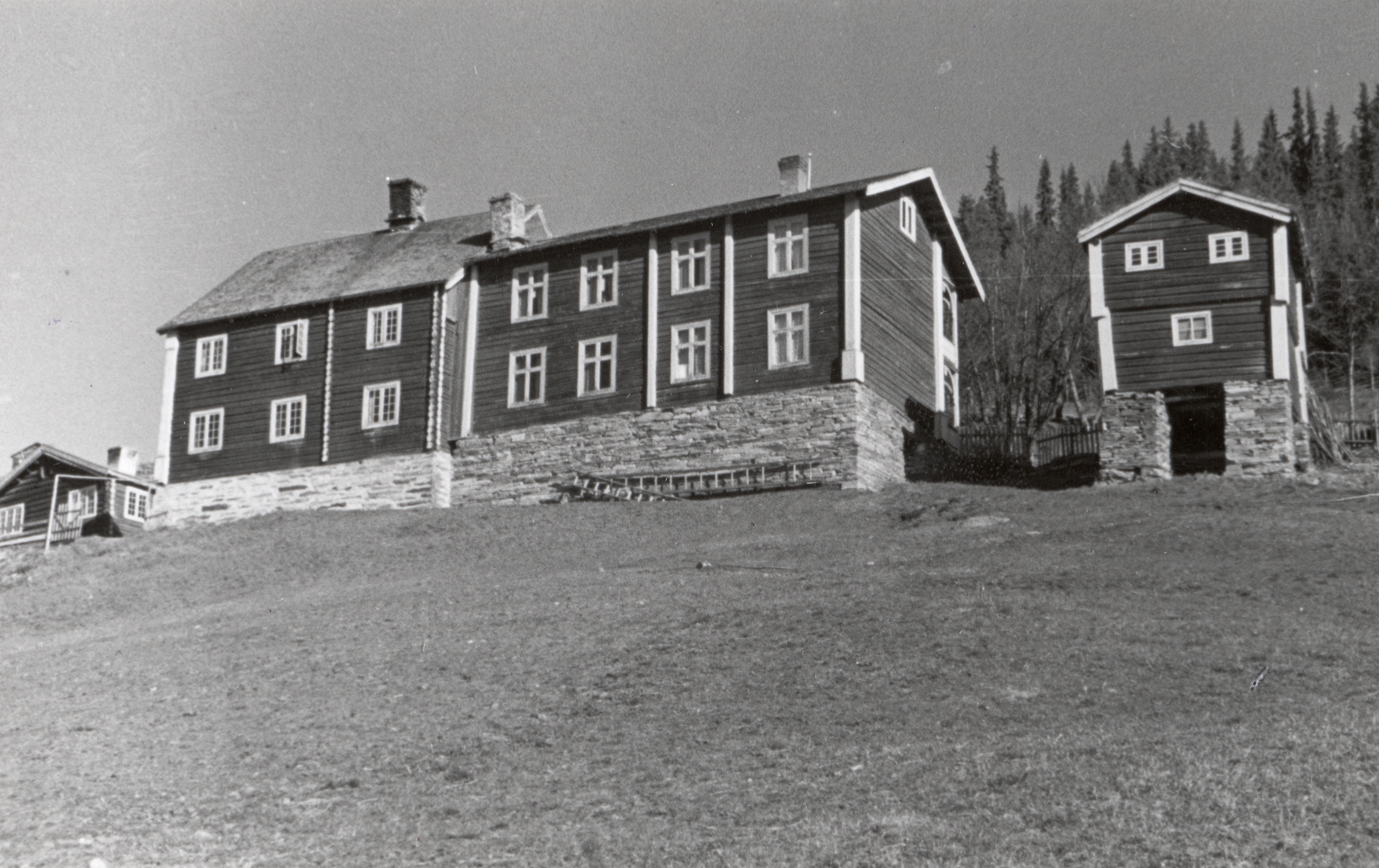 Sollien, Sollia i Sollia, Hedmark This image on crowdsourcing geotagging platform Fotodugnad